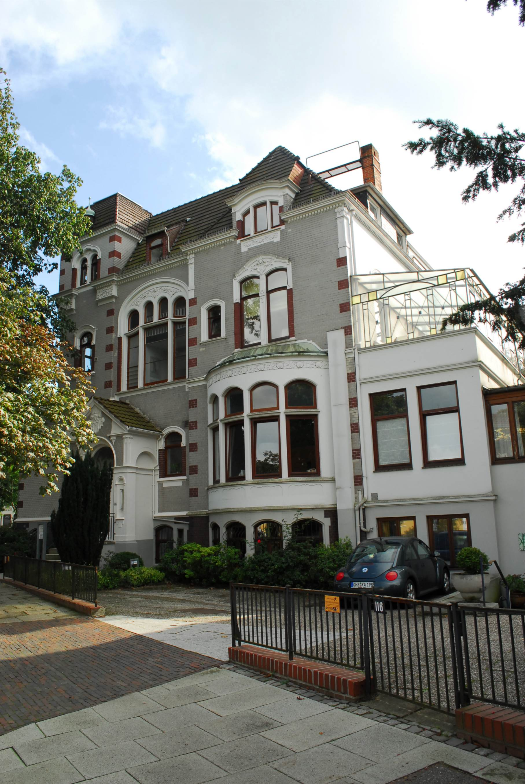 Haus Loose in Bremen, Parkstraße 116 / Slevogtstraße 60.Das abgebildete Objekt ist ein geschütztes Kulturdenkmal in der Freien Hansestadt Bremen, mit der Nr. 1145 beim Landesamt für Denkmalpflege registriert.